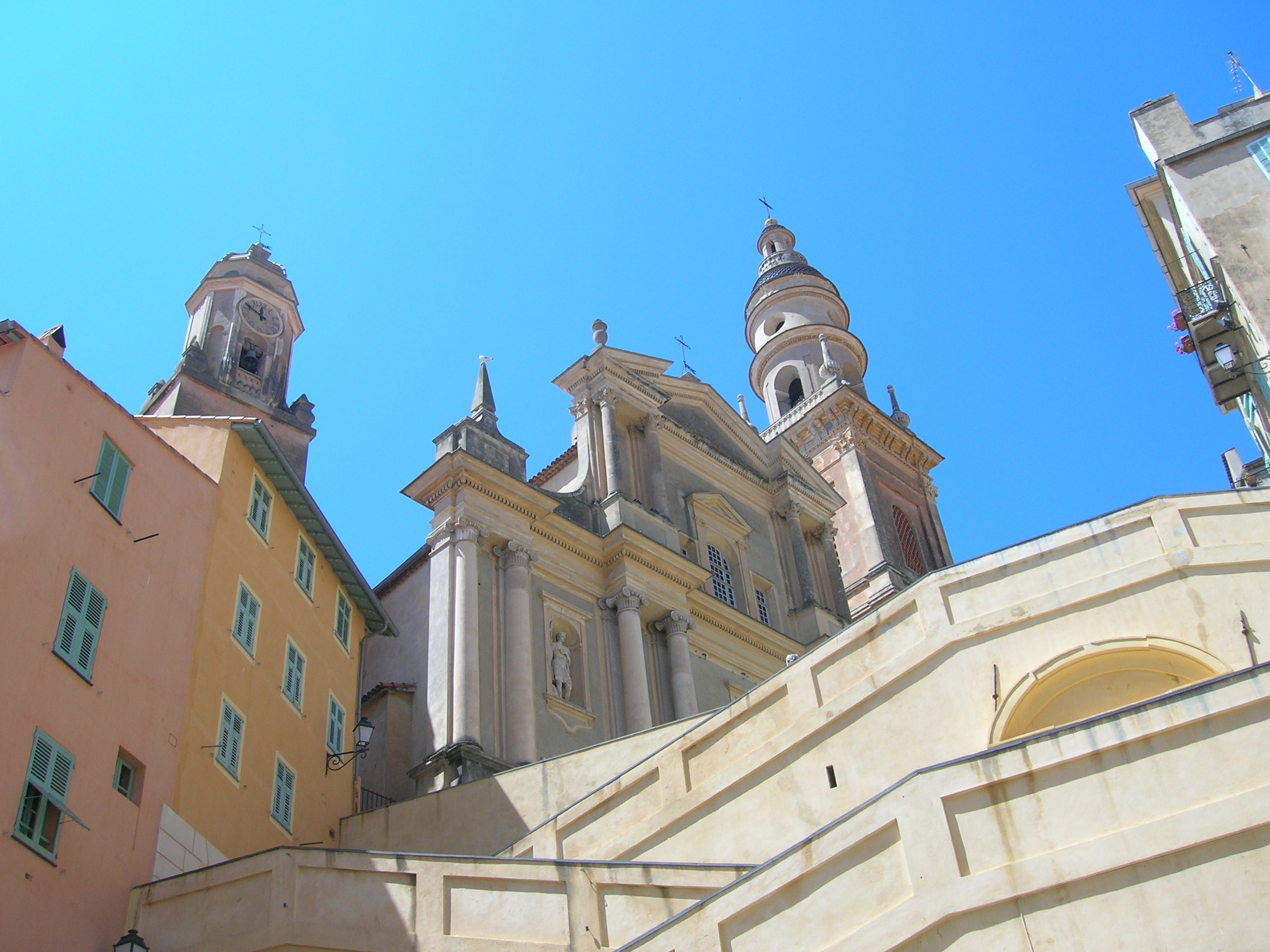 SanktMechelsbasilika